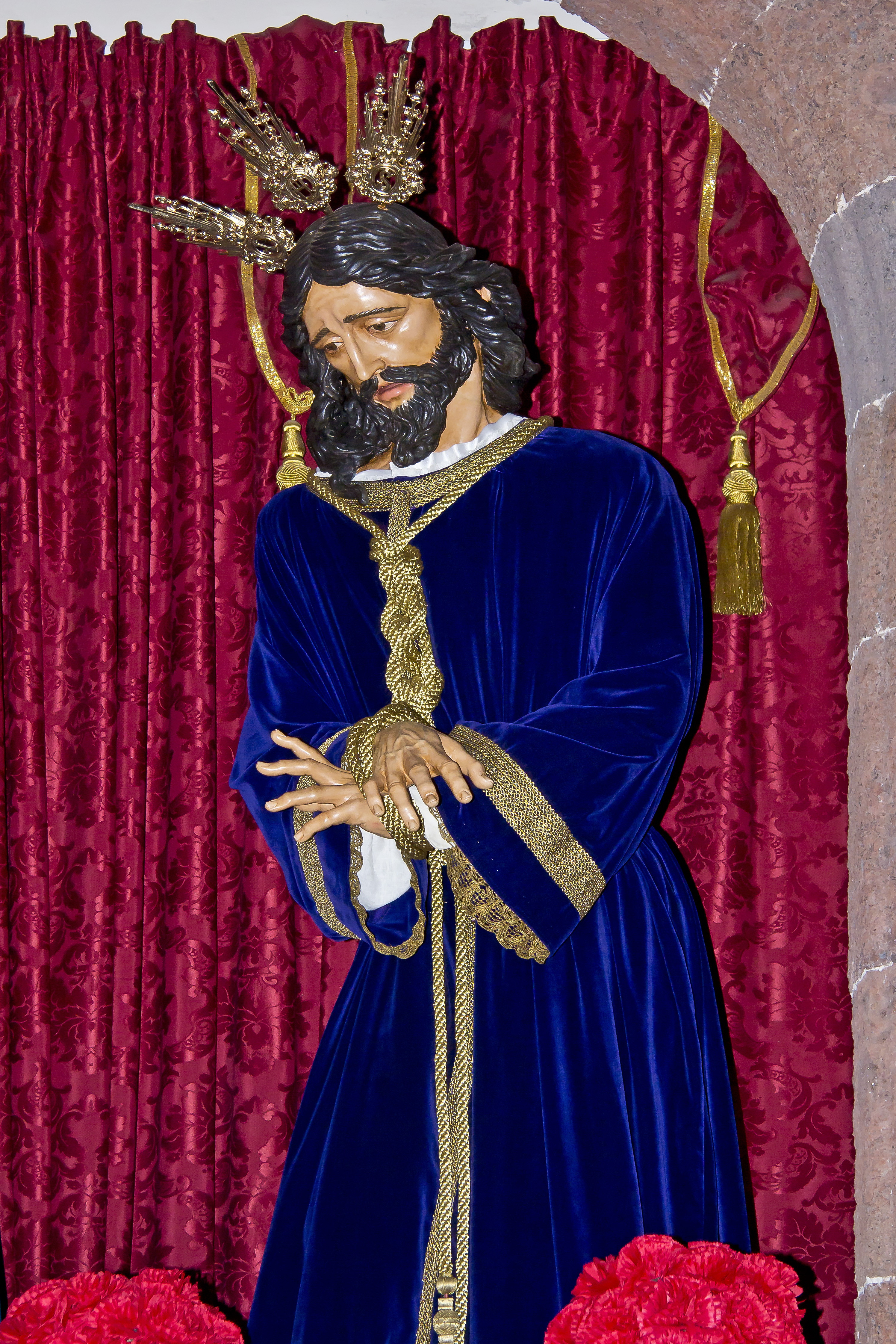 Nuestro Padre Jesús Cautivo de Juan Delgado Martín-Prat en la Iglesia Nuestra Señora de la Concepción en Santa Cruz de Tenerife